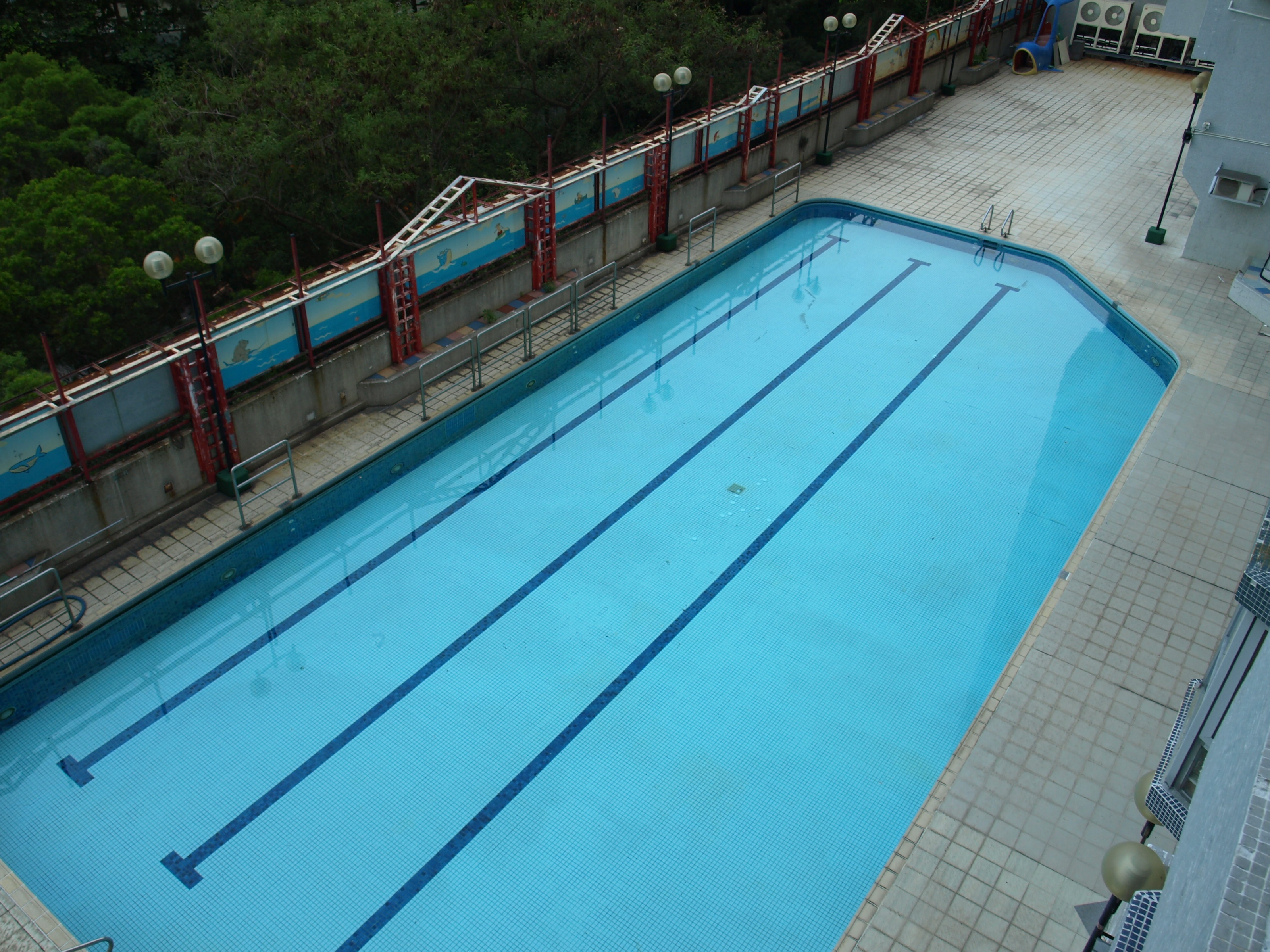 中文（香港）: 海濱花園會所泳池